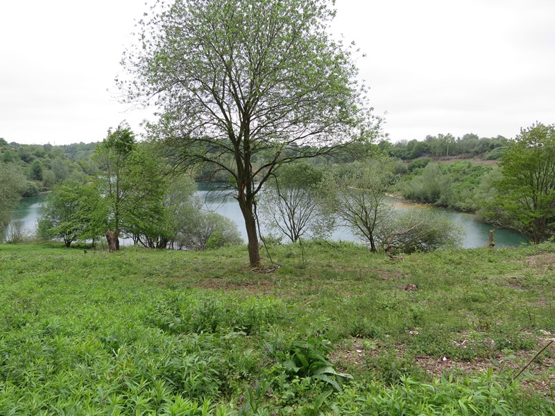 Blick über Baggersee Richtung Ost, Naturschutzgebiet MG 016 „Baggersee Vorster Busch“